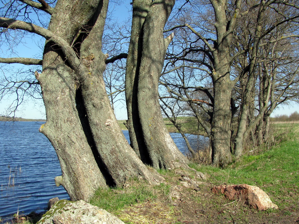 Берег озера Яново около деревни Бикульничи. Lakefront Yanovo